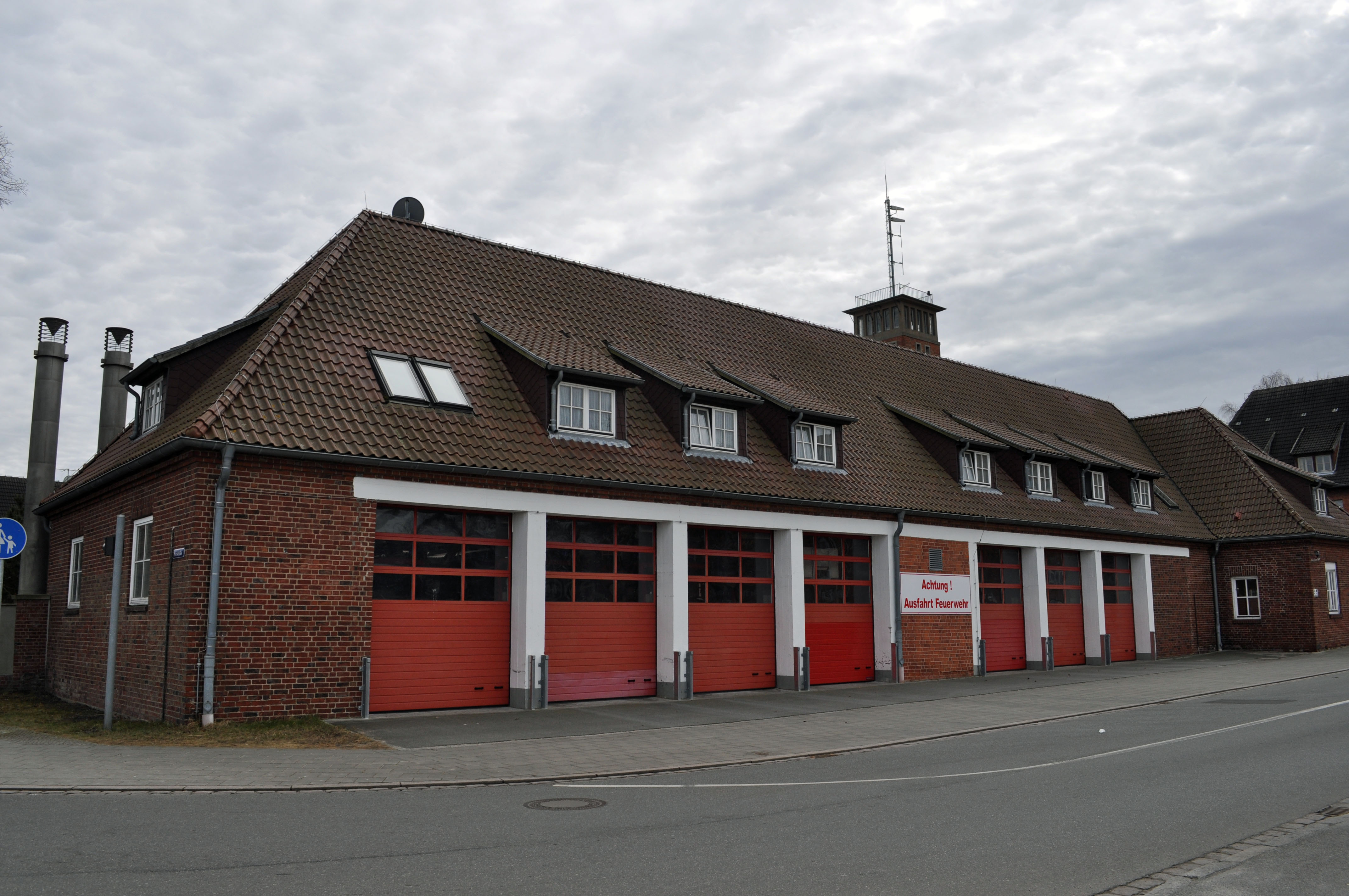 Gebäude bzw. Gebäudedetail in Stralsund. Straße und Hausnummer siehe Dateiname.